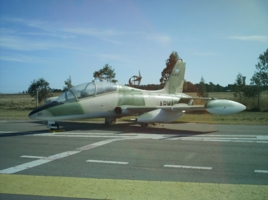 4-A-117 luego de su restauración.